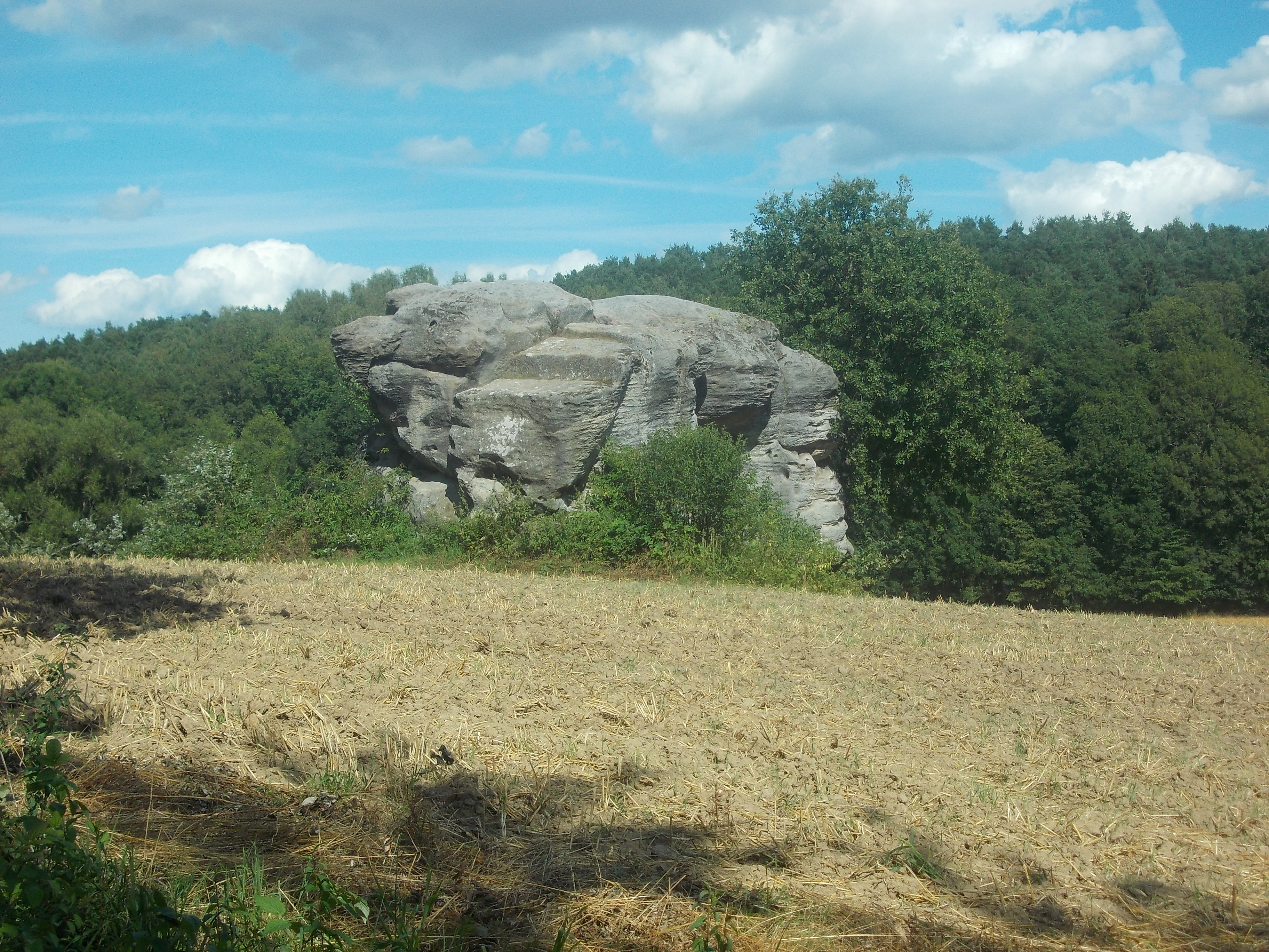 Viertelstein (syn. Teufelstein) bei Mistelbach (Oberfranken).